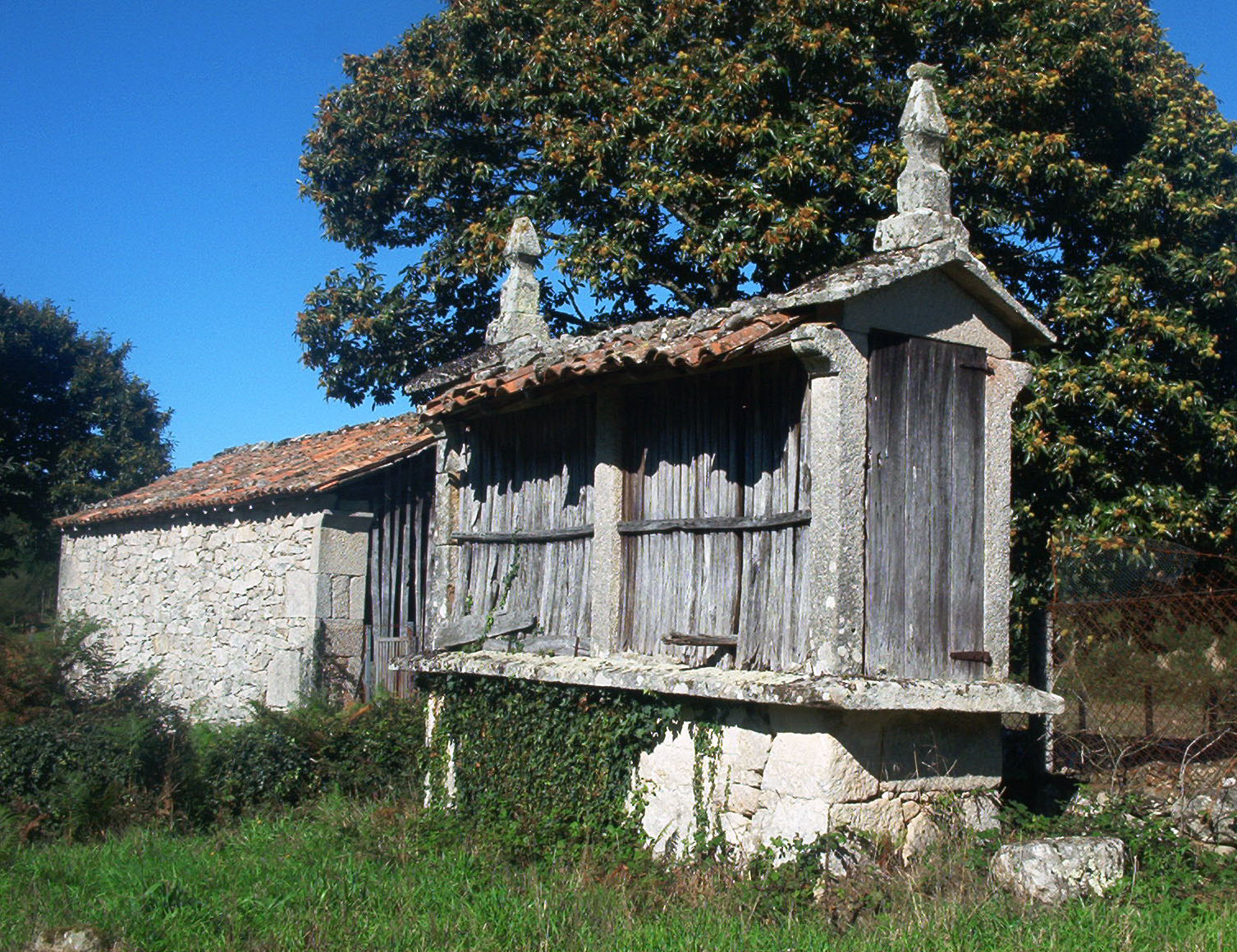 Hórreo de tipo mahía, erguido sobre soleira de mampostería, de dous claros e con porta penal. Cuberto con tella do país, adornado con dosu lampións coas tres formas xeométricas máis habituais na zona: prisma, pirámide e esfera (ausente nun deles). Ubícase no lugar de Amarante, na parroquia de Santo Estevo do Castro de Amarante (Antas de Ulla)